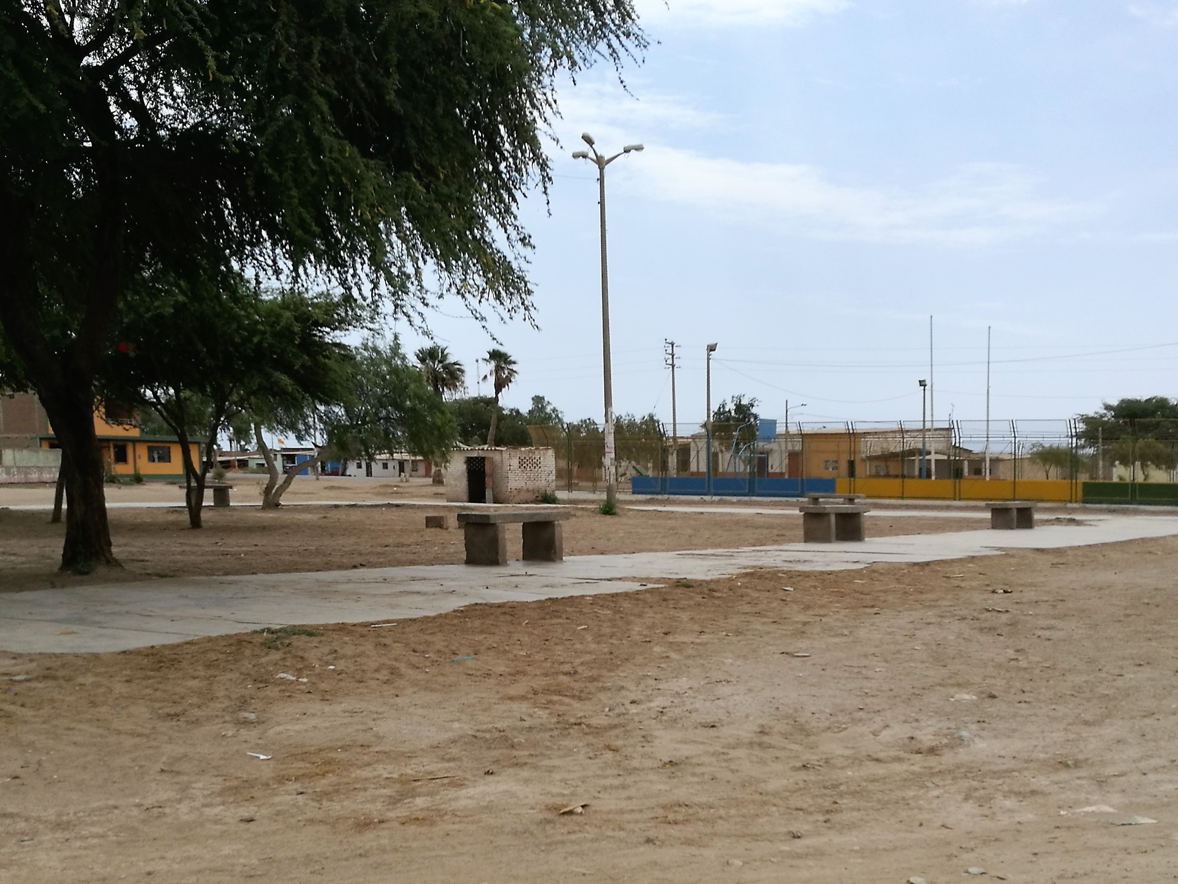 Plaça i pista esportiva de Capote